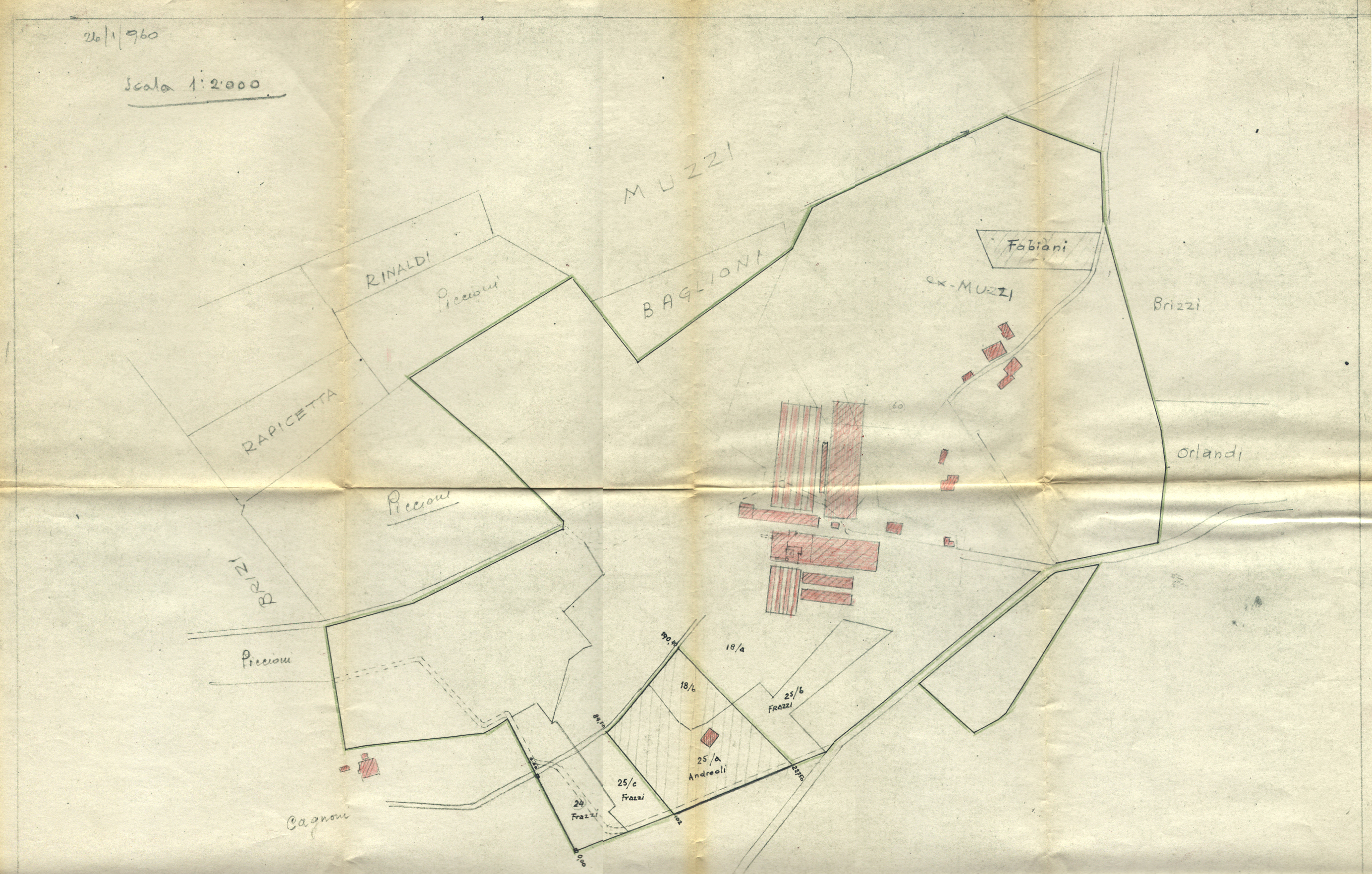 Pianta della Fornace Frazzi del 1960